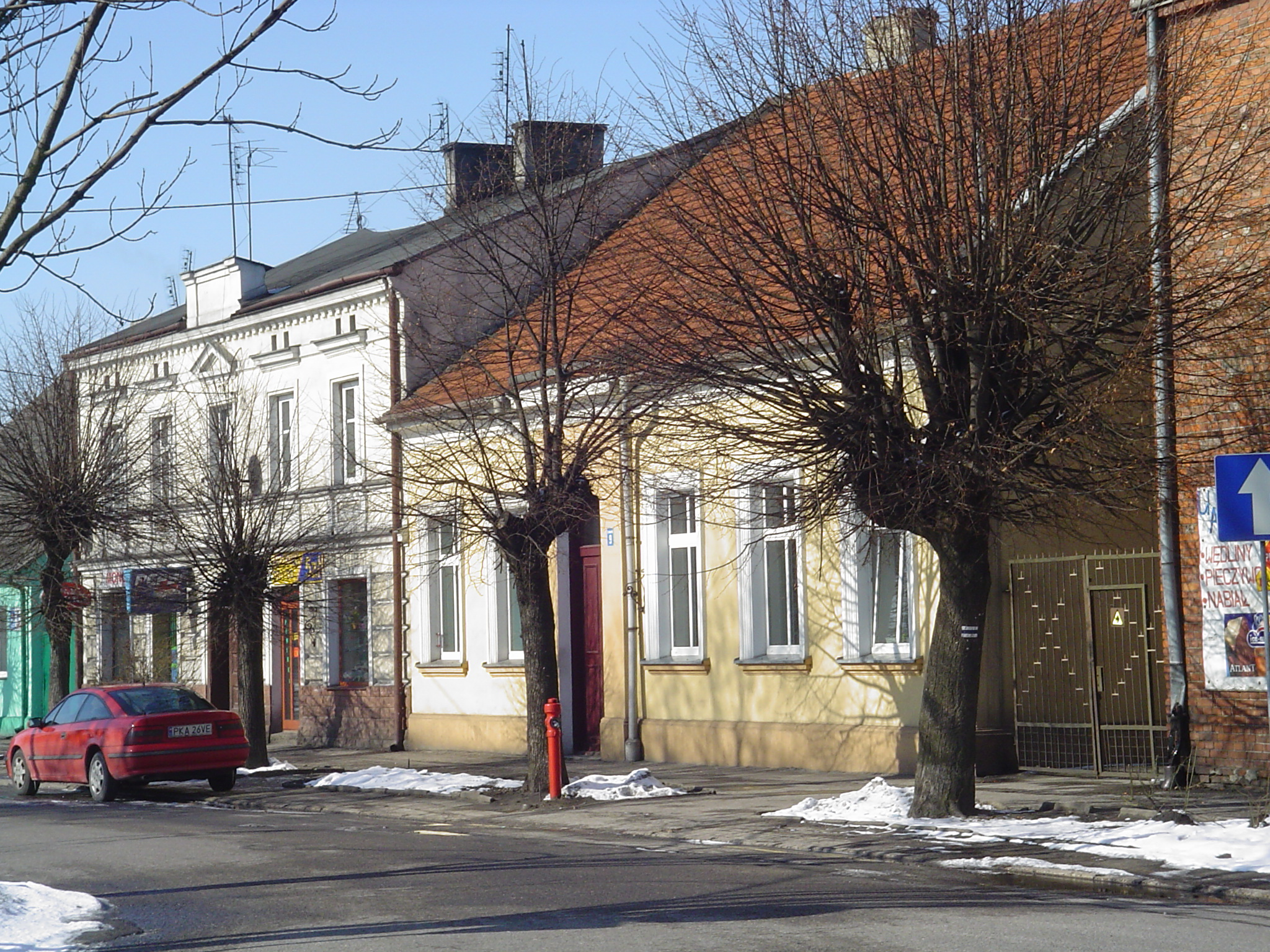 Road in Opatówek